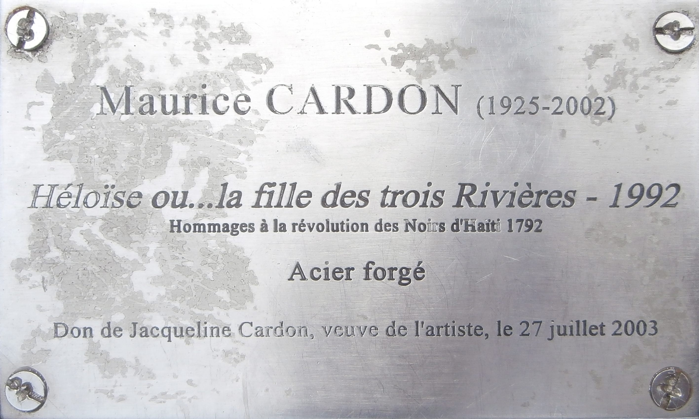 Plaque descriptive de la sculpture Héloïse ou… la fille des Trois-Rivières par le scupteur Maurice Cardon. Photographiée le 13 août 2013.